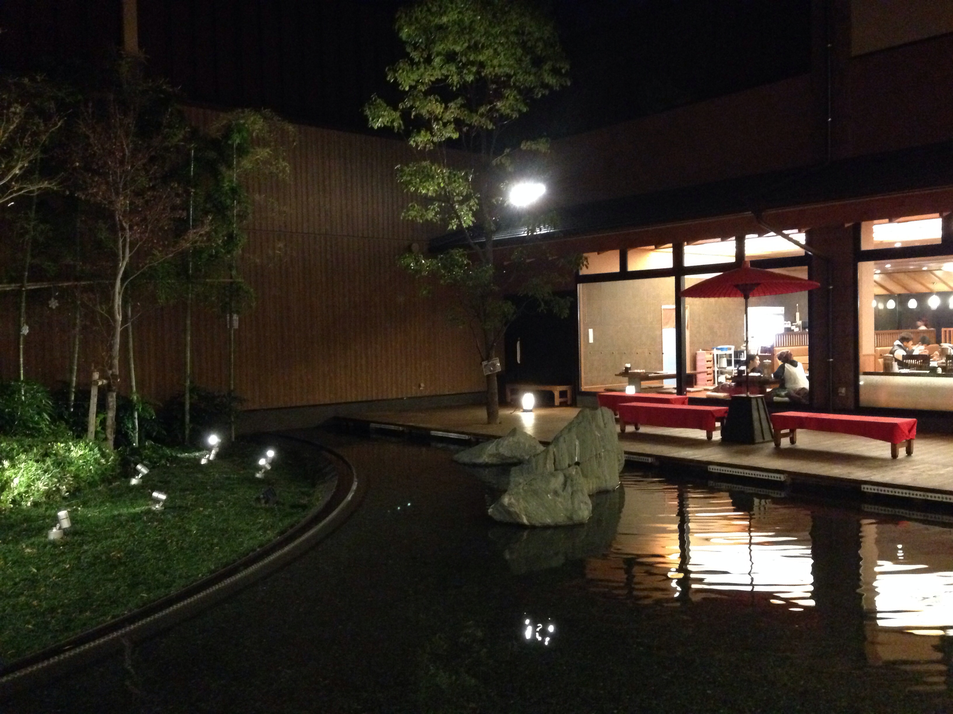 塩屋天然温泉 ほの湯 楽々園の中庭。